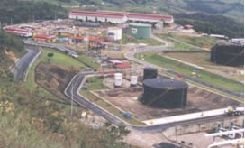 Estación de Bombeo